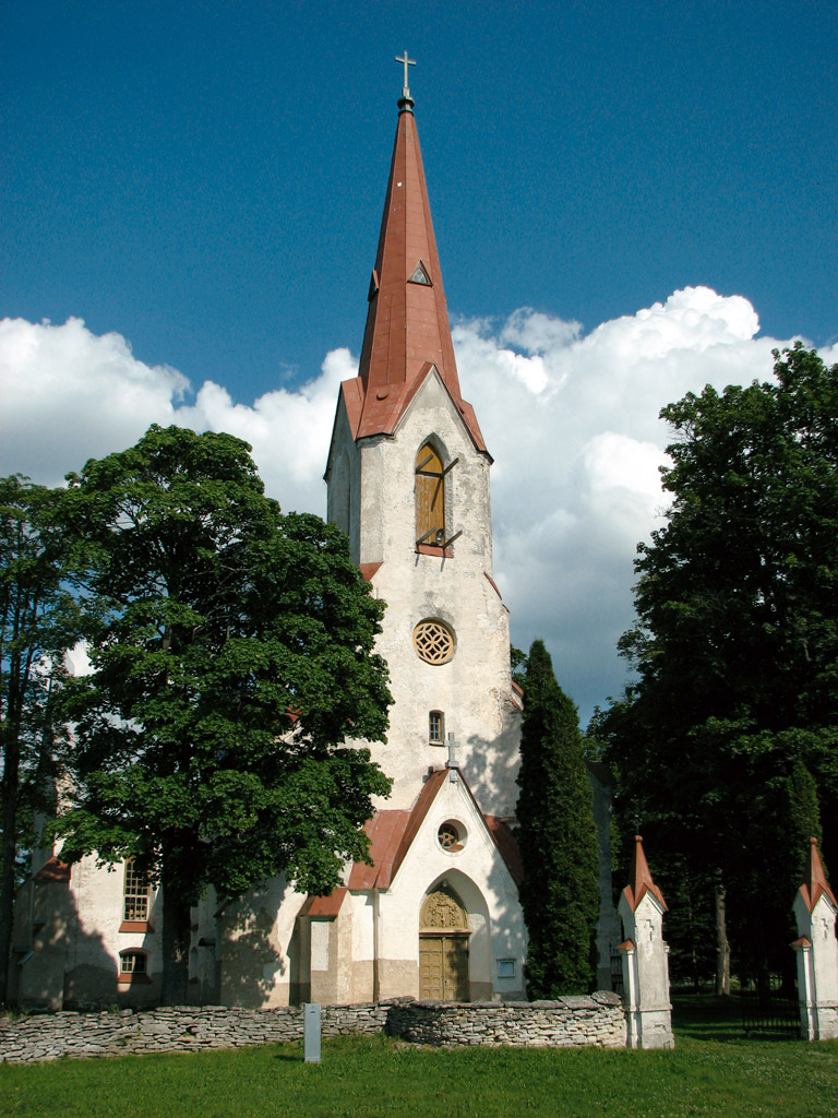 Juuru kirik